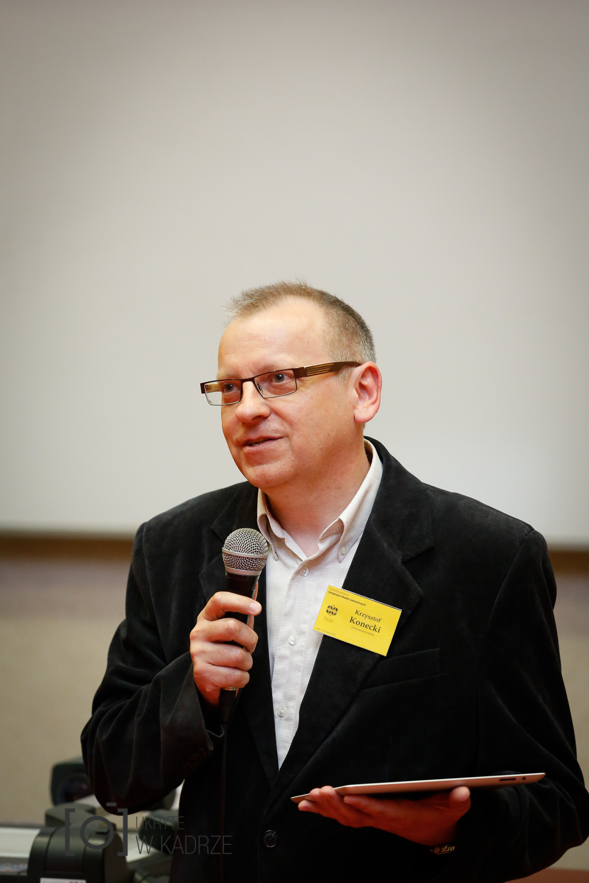 zdjęcie